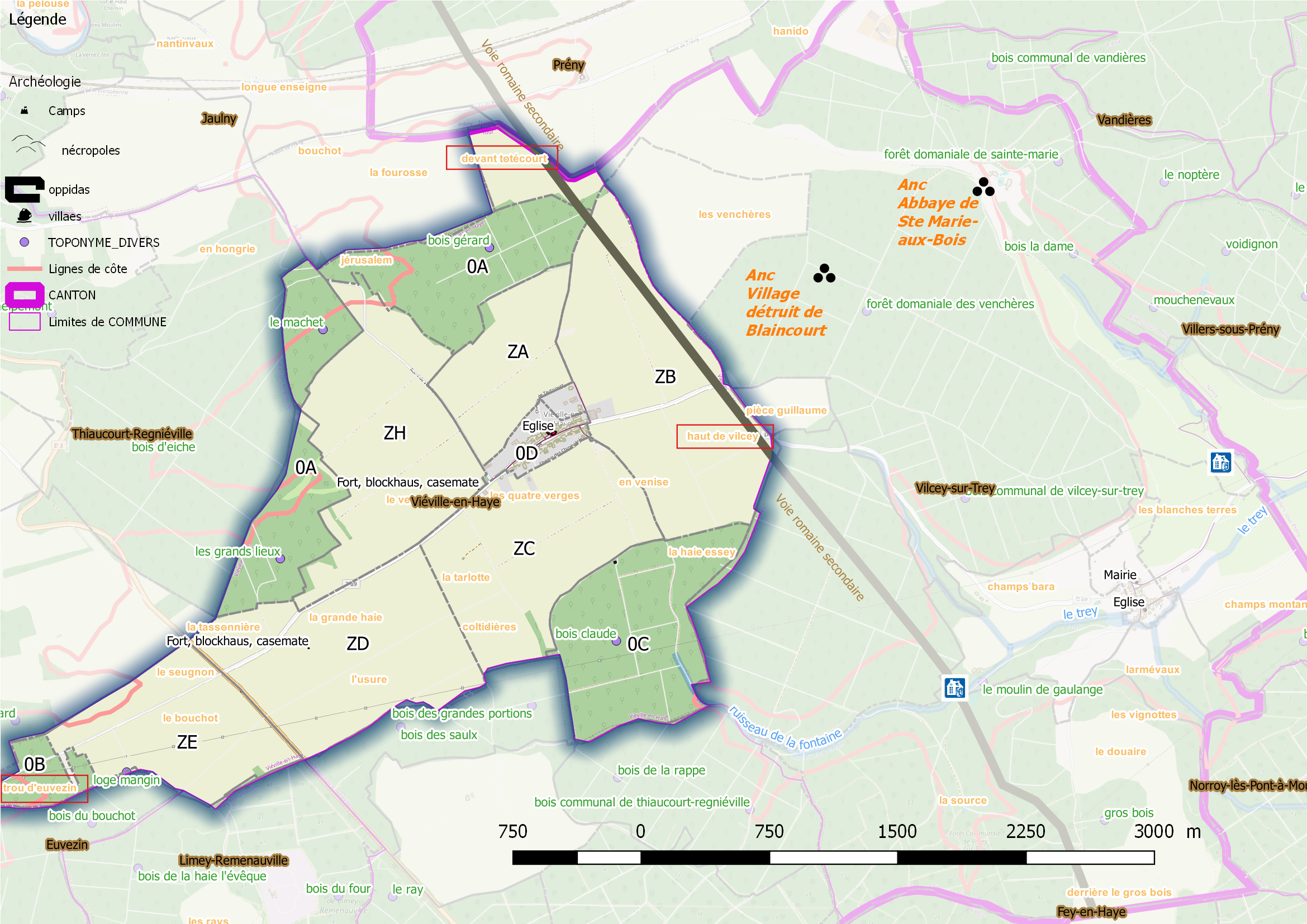 Vieville (ban communal), OSM et Qgis, mentions additionnelles